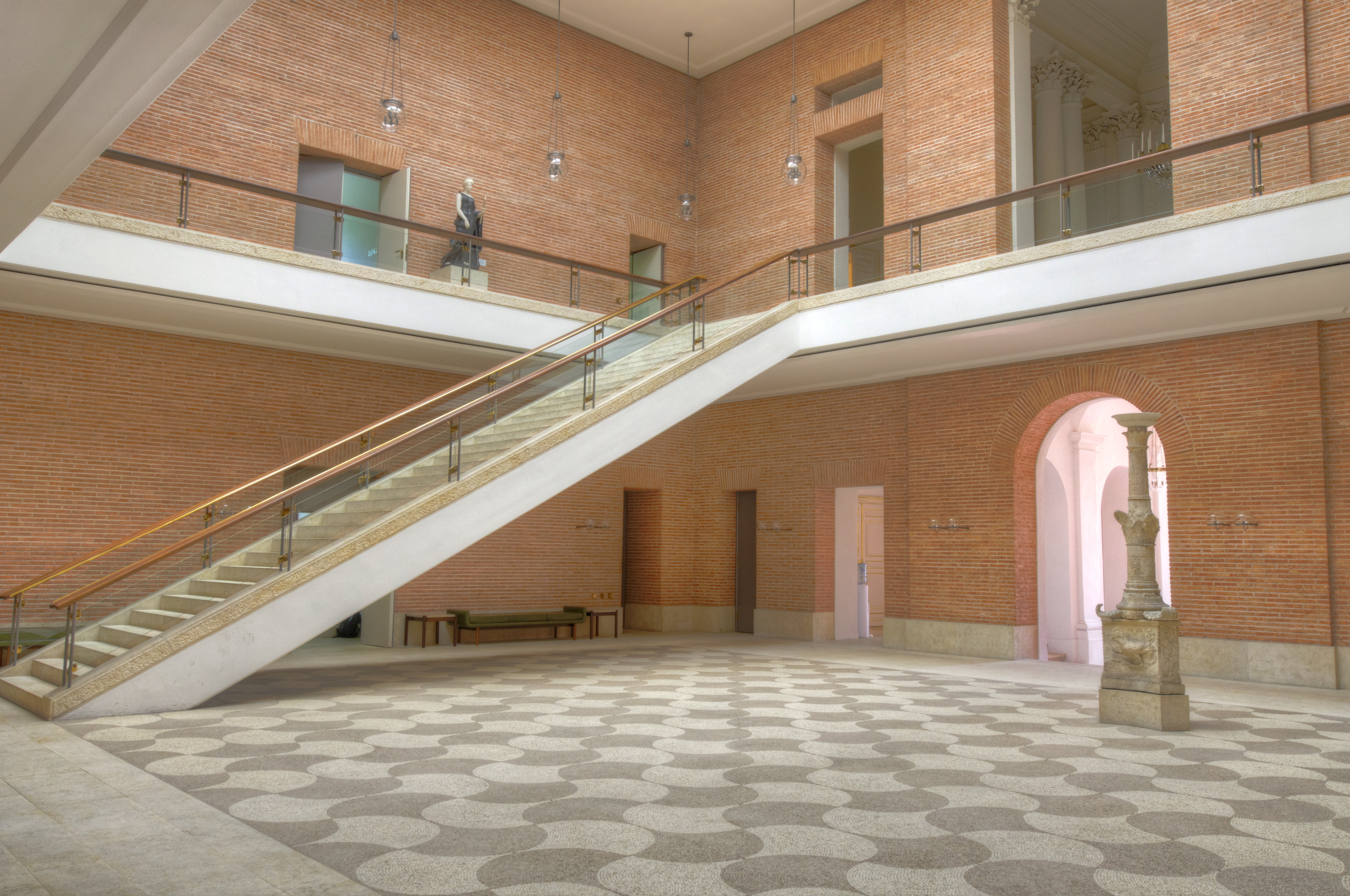 Landtagsprojekt Bayern - Prinz-Carl-Palais